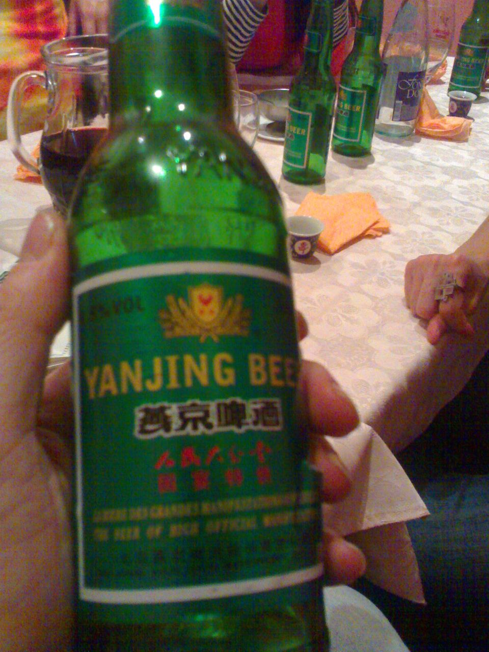 A l'ós panda. VERDI. SOPAR "estupendu" per 11 euros per cap.